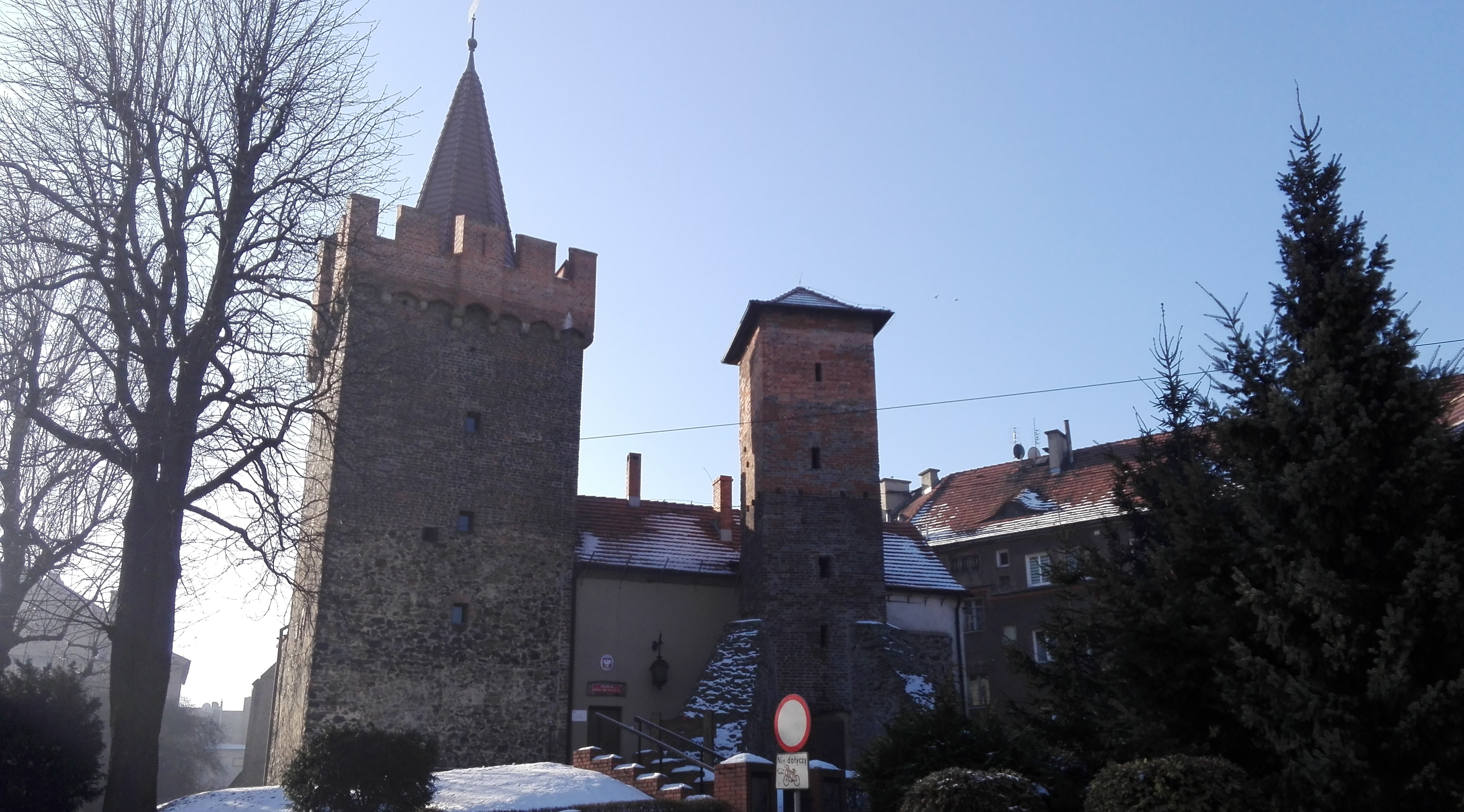 Prudnik, mury obronne (2 baszty po remoncie), XV–XVI, Muzeum Ziemi Prudnickiej 10.1958 and 867/64 from 12.05.1964.